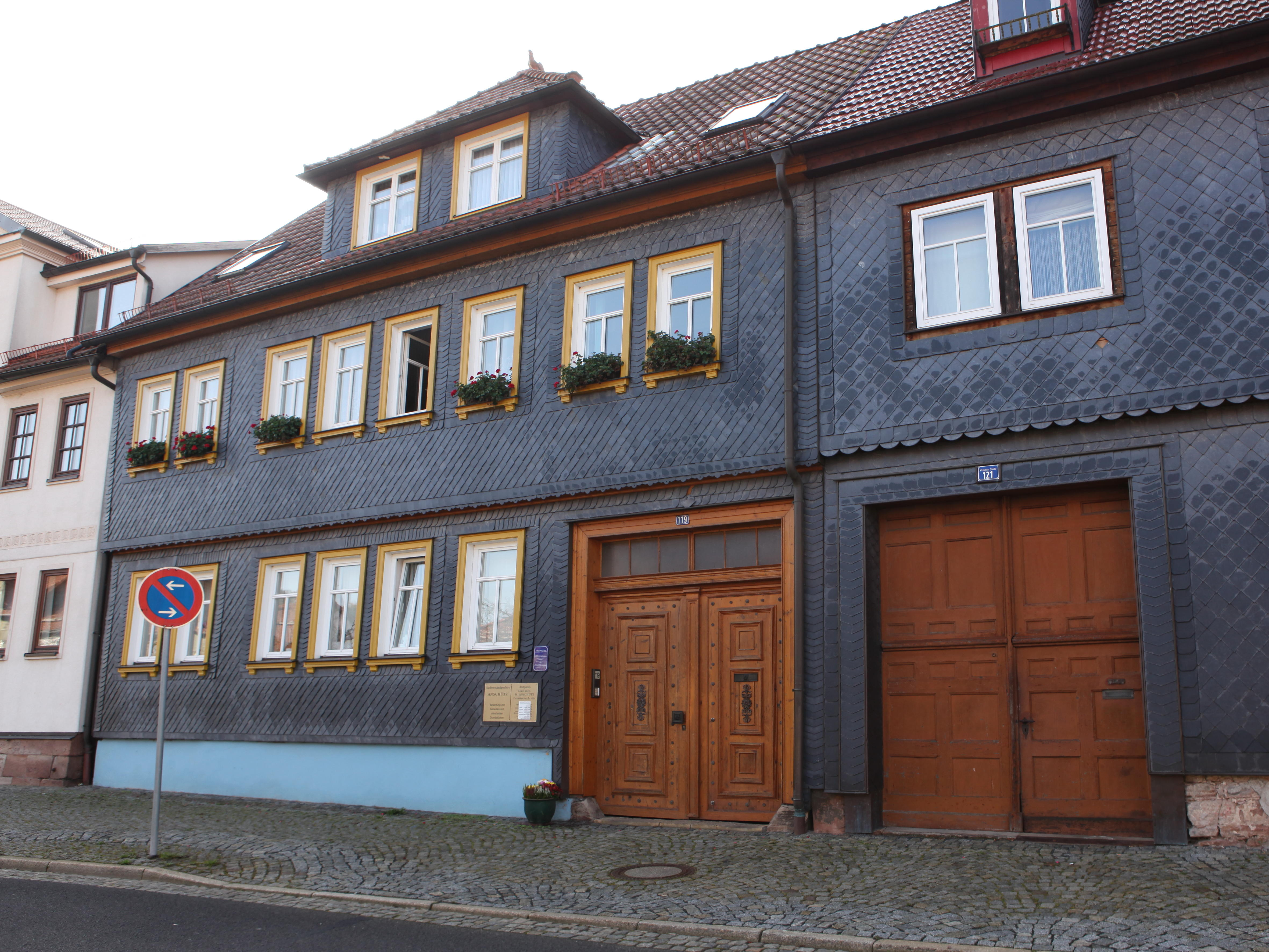 Suhl, OT Heinrichs, Meinigerstraße 119